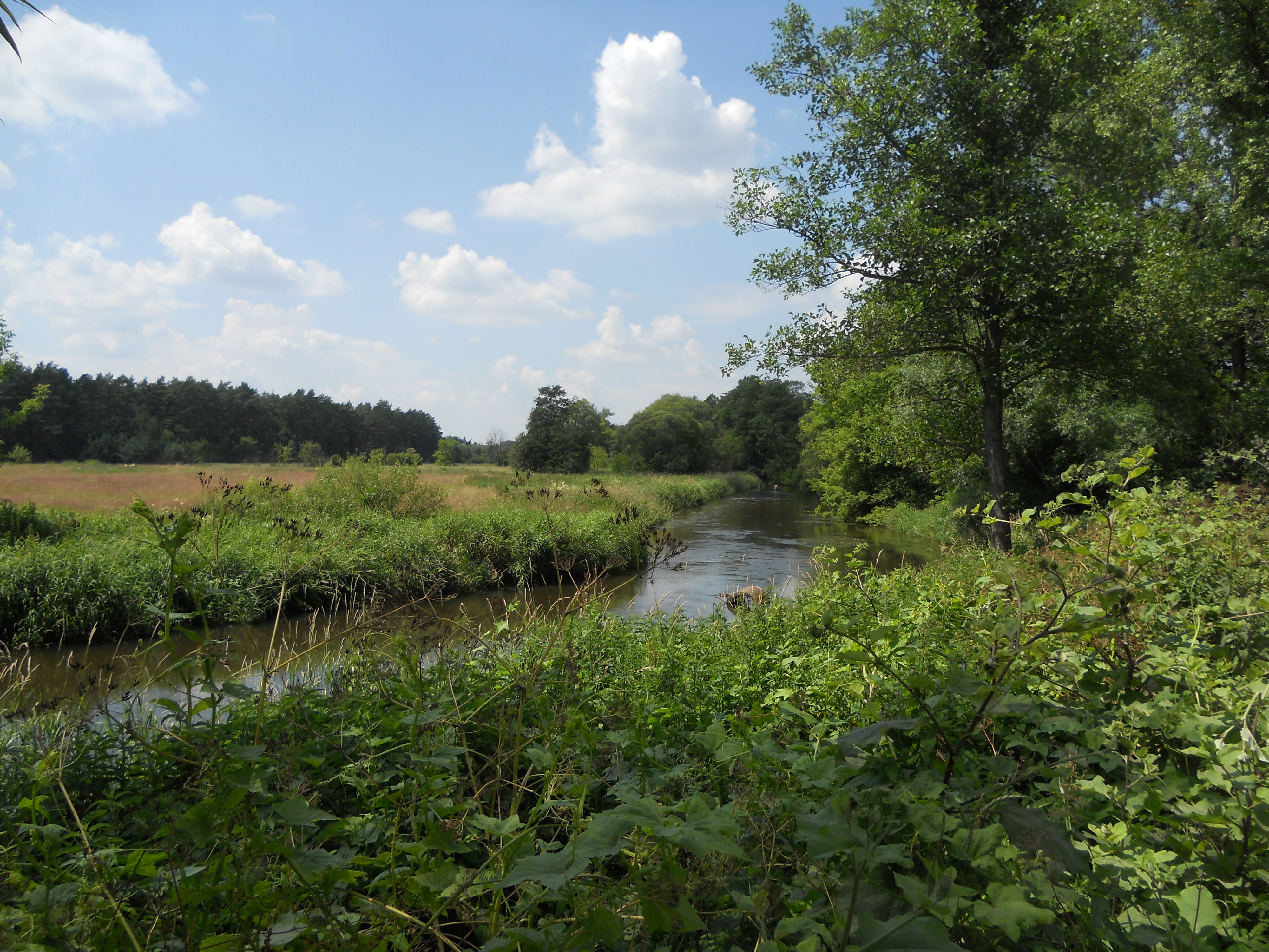 Świder w Dobrzyńcu